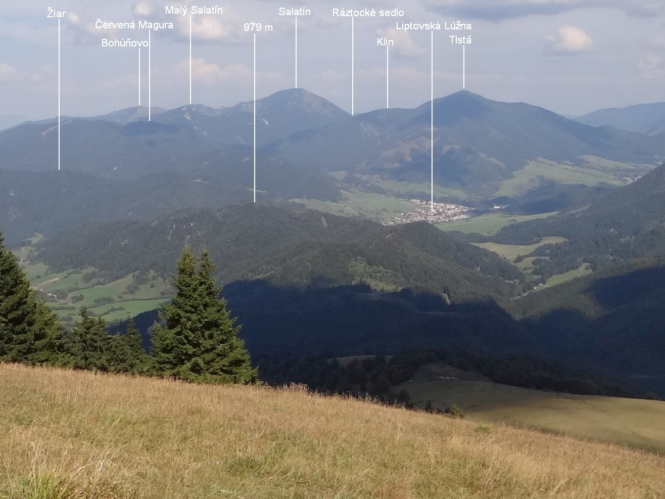 View from Maly Zvolen